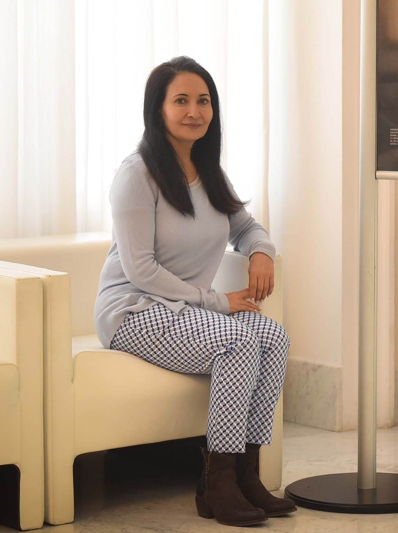 Diez años y divorciada (directora) Fotografía: Iñigo Royo